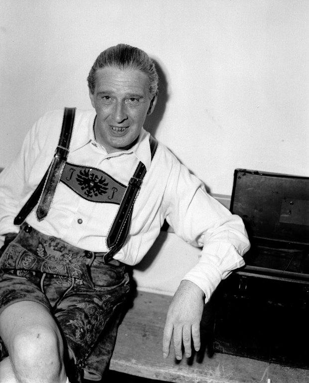 Julius Patzak in der Garderobe des Salzburger Festspielhauses (Salzburger Festspiele 1947).